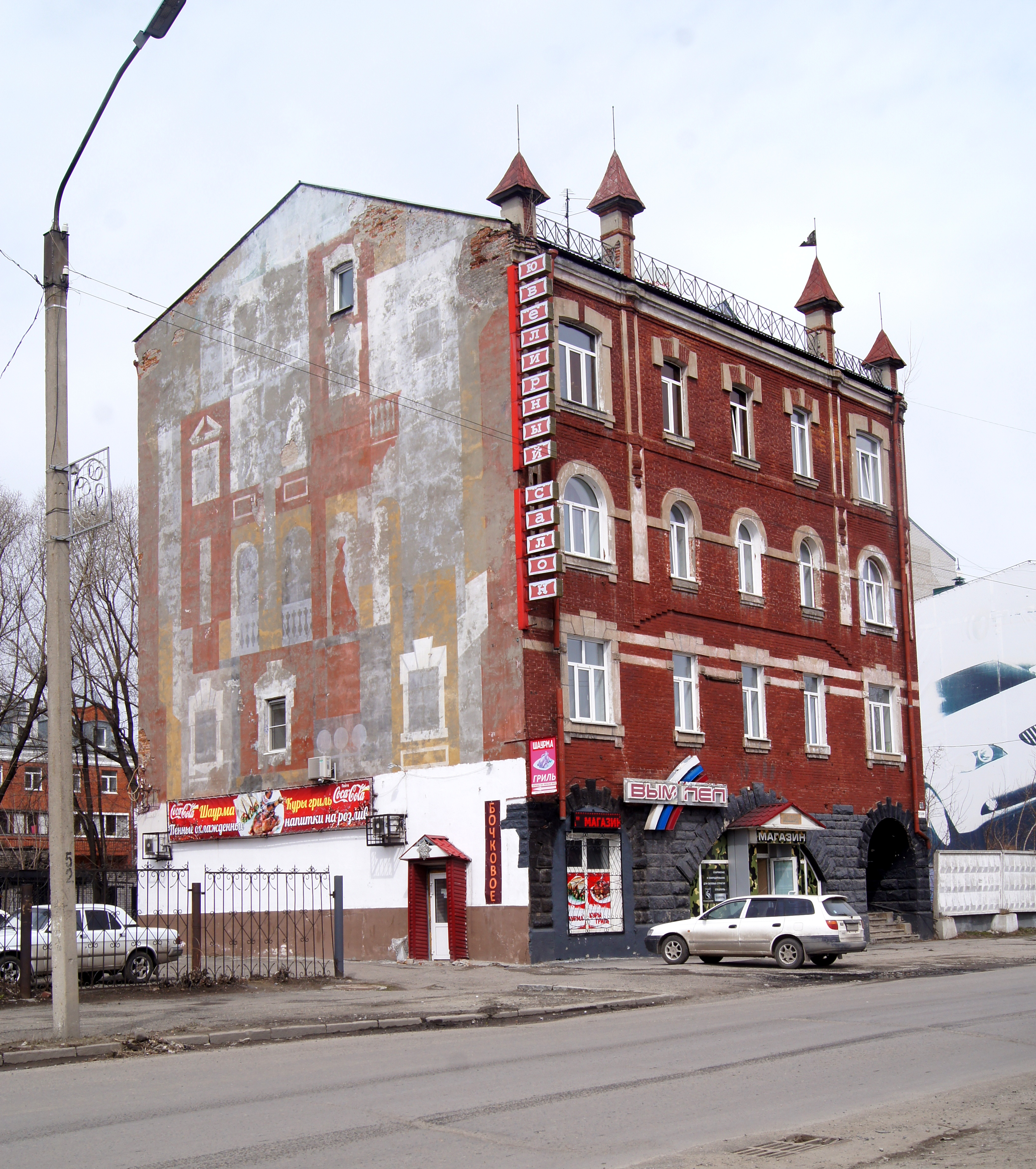 Доходный дом Аверина: улица Гоголя, 76, Барнаул, Алтайский край